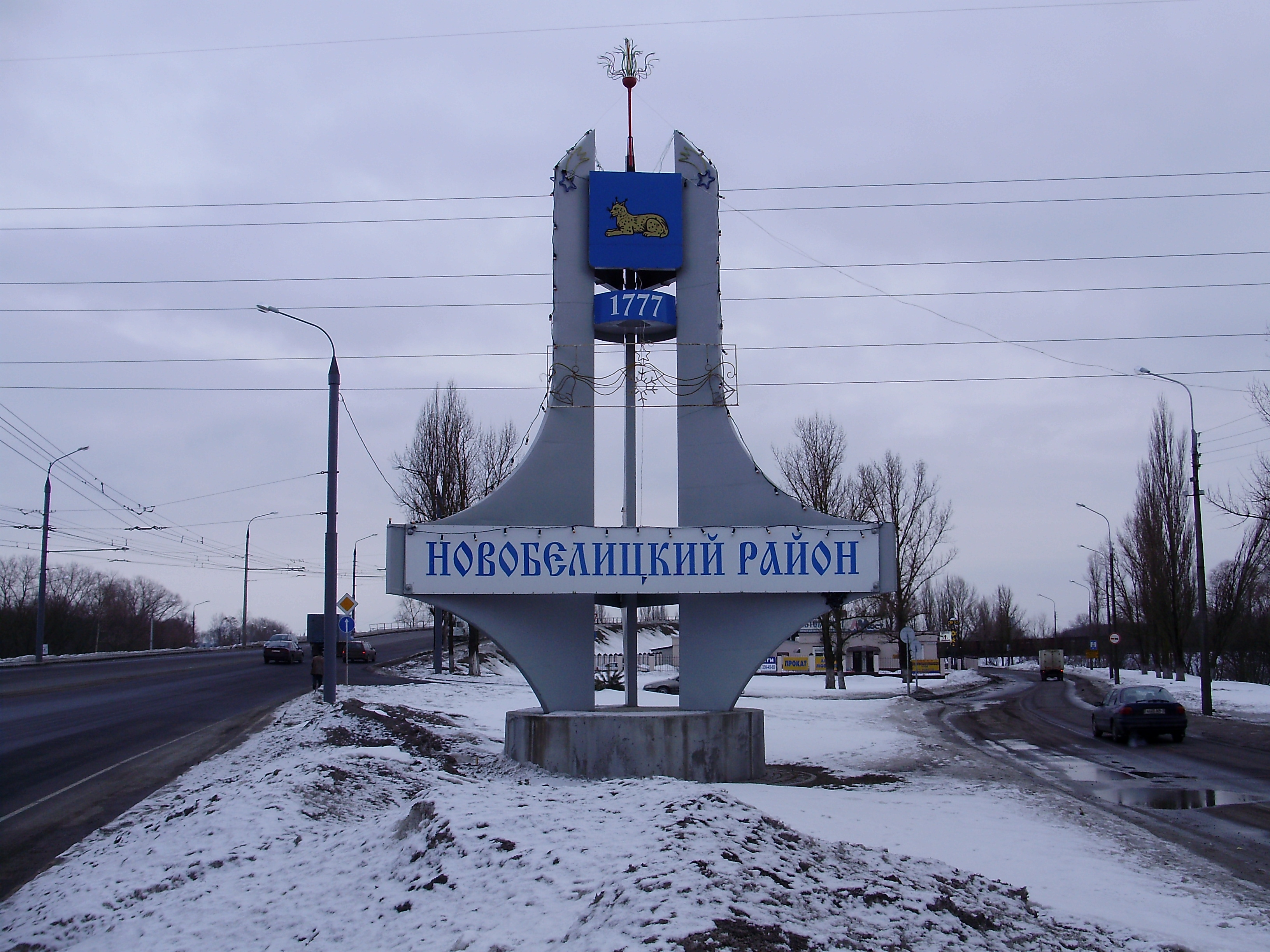 Беларуская (тарашкевіца): "Скульптурная кампазіцыя" на ўездзе ў Навабеліцкі раён горада Гомеля